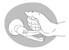 ภาพแสดงมือจับล็อคประตูห้อง ที่ใช้แรงน้อย เบาแรง ไม่ว่าสภาพแรงกายอย่างไรก็สามารถเปิดได้